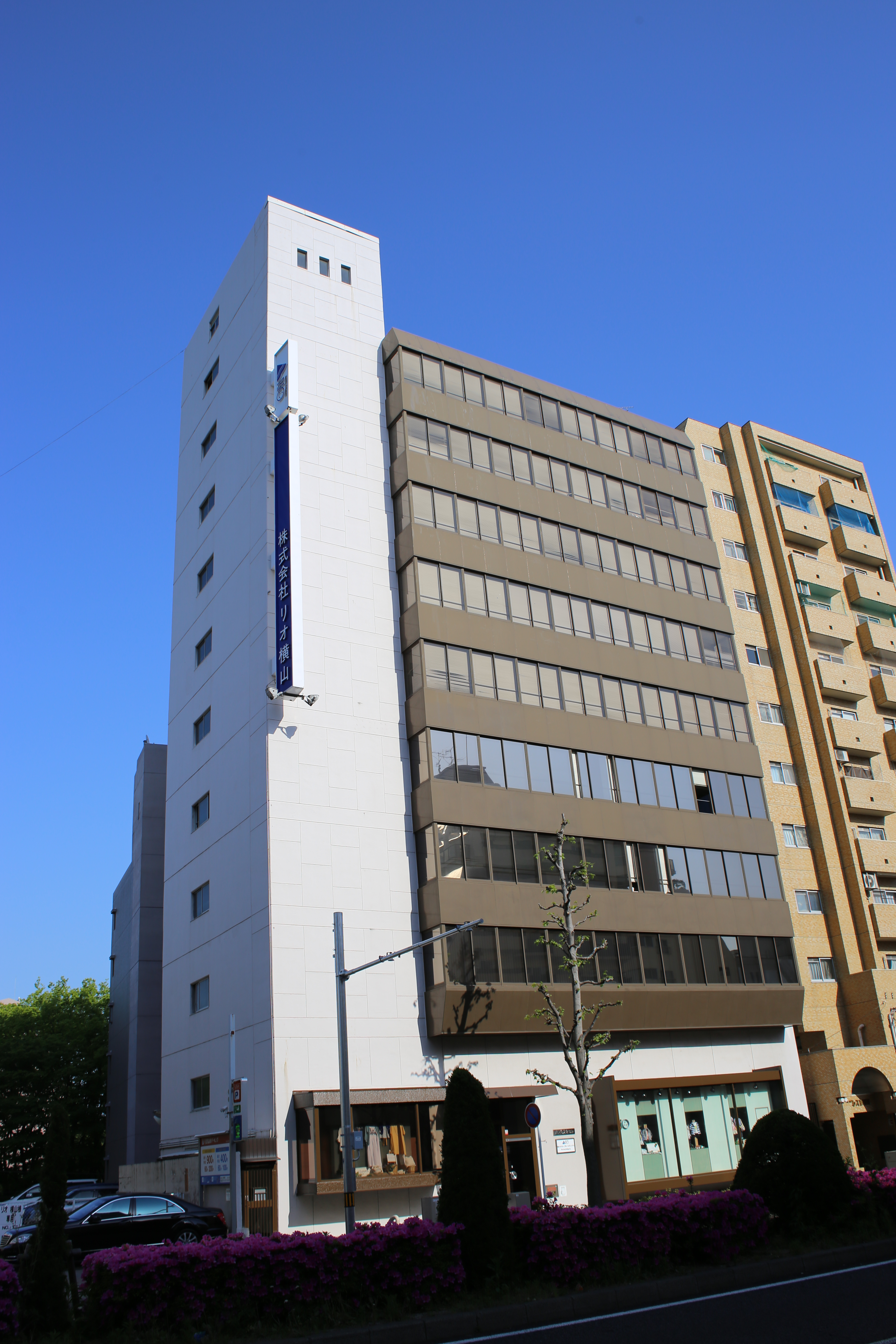 名古屋市中区平和一丁目のリオグループホールディングス本社を西側公道北側より撮影